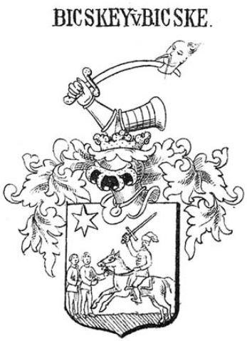 A bicskei Bitskey család cimere